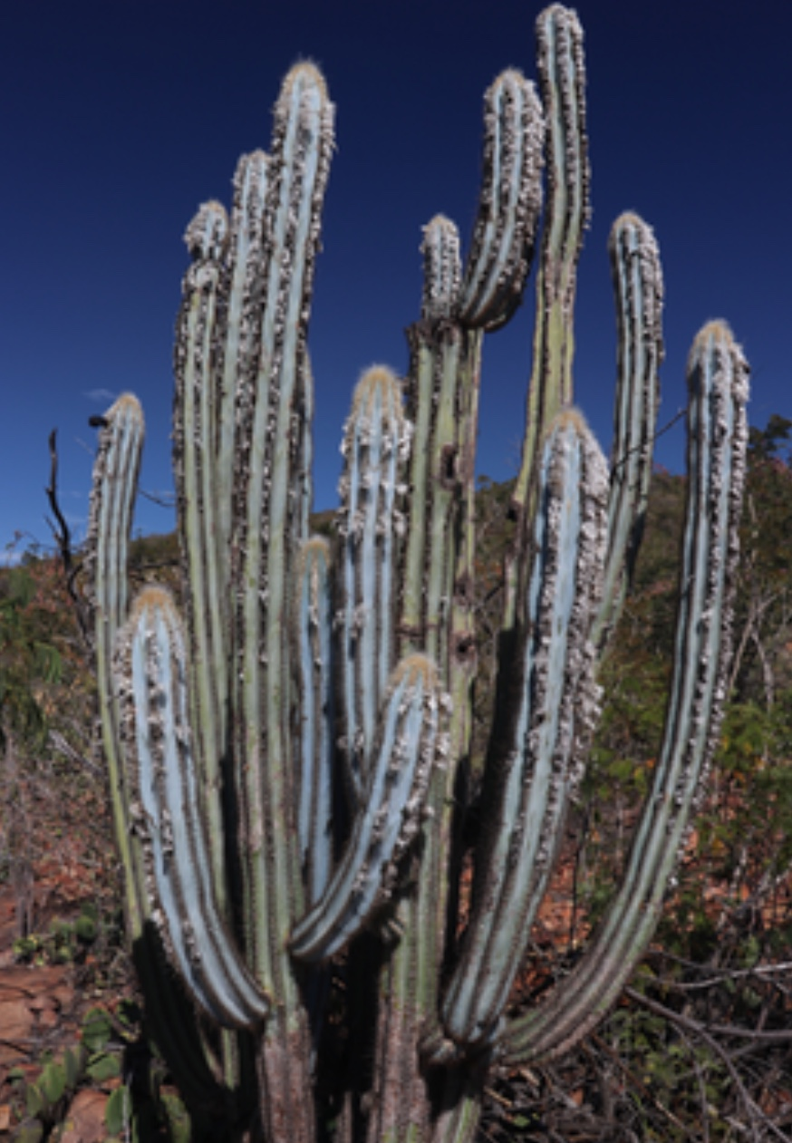 Pilosocereus pachycladus Bahia Brasil